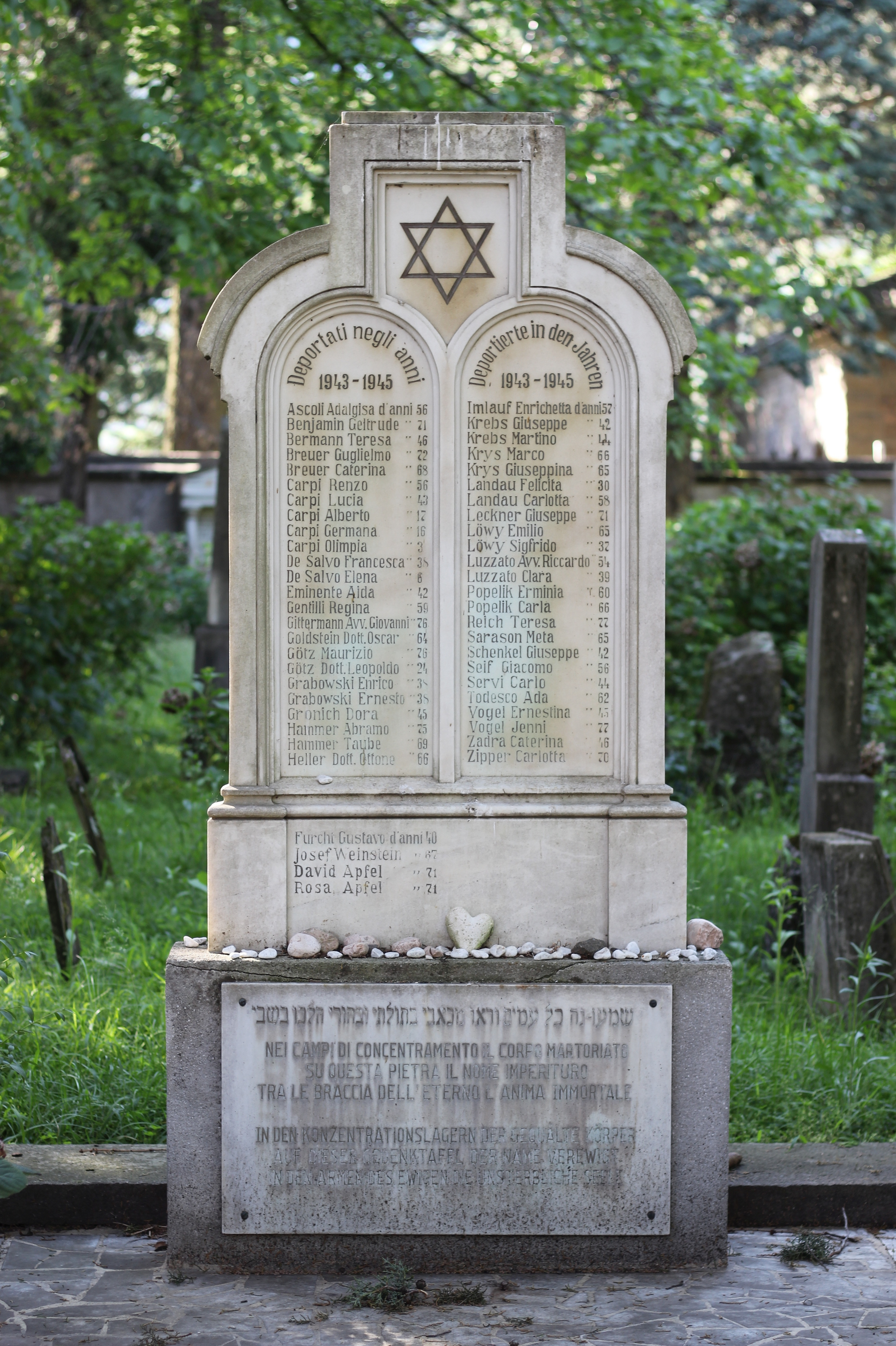 Meran Jüdischer Friedhof Gedenkstein